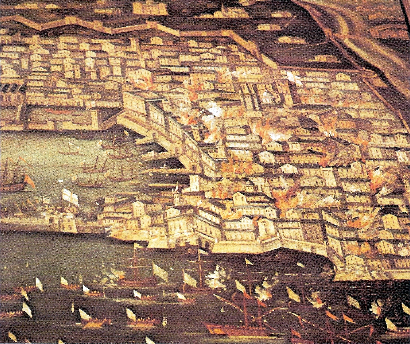 Dipinto raffigurante il bombardamento su Genova della flotta francese nel 1684